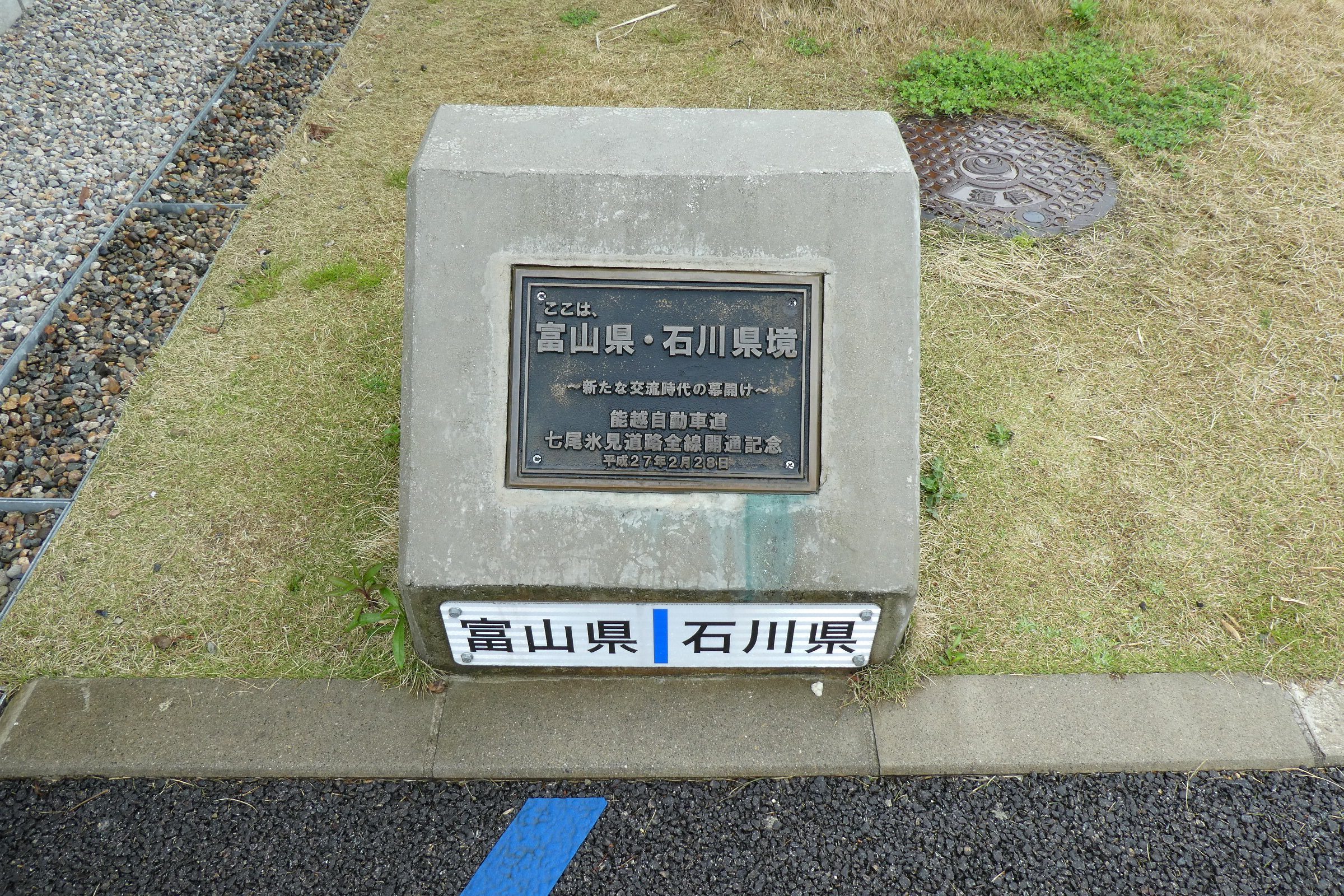 能越自動車道、能越県境パーキングエリア（石動山側）にある七尾氷見道路開通記念プレート。